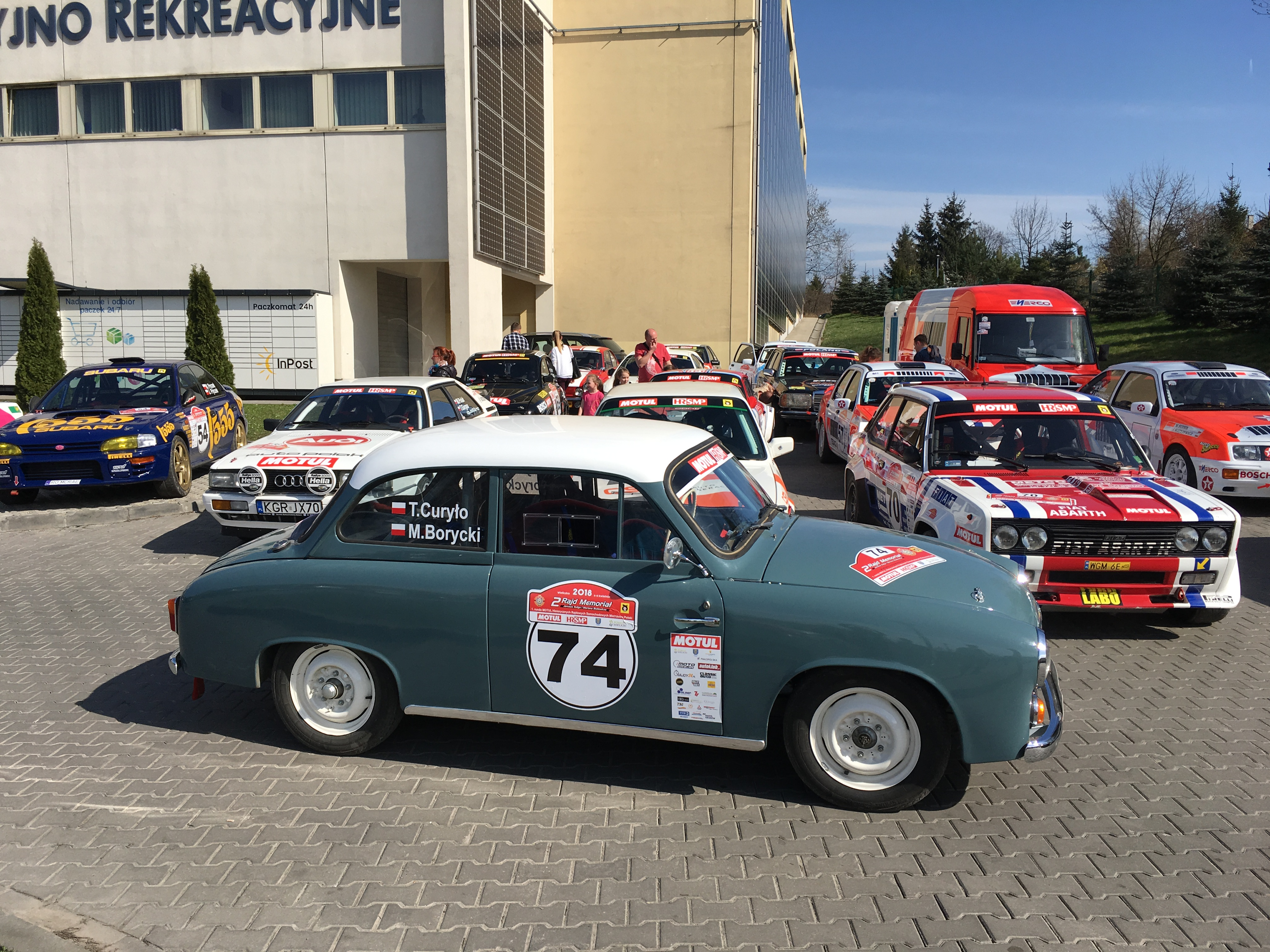 Rajd Memoriał Kuliga i Bulewiczaa 2018